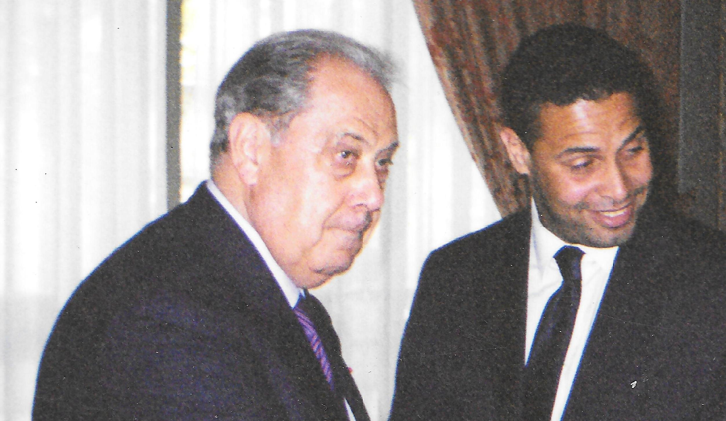 Conseil général des Hauts-de-Seine